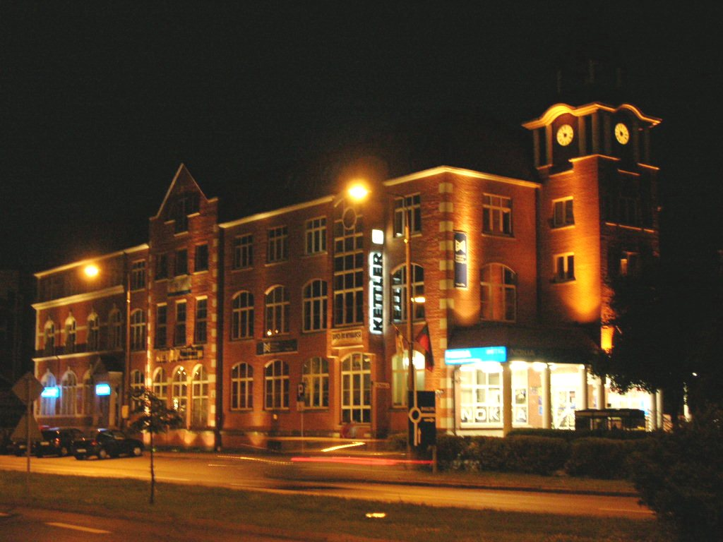 Piła - Budynek TP S.A. Autor - Bartek Wawraszko